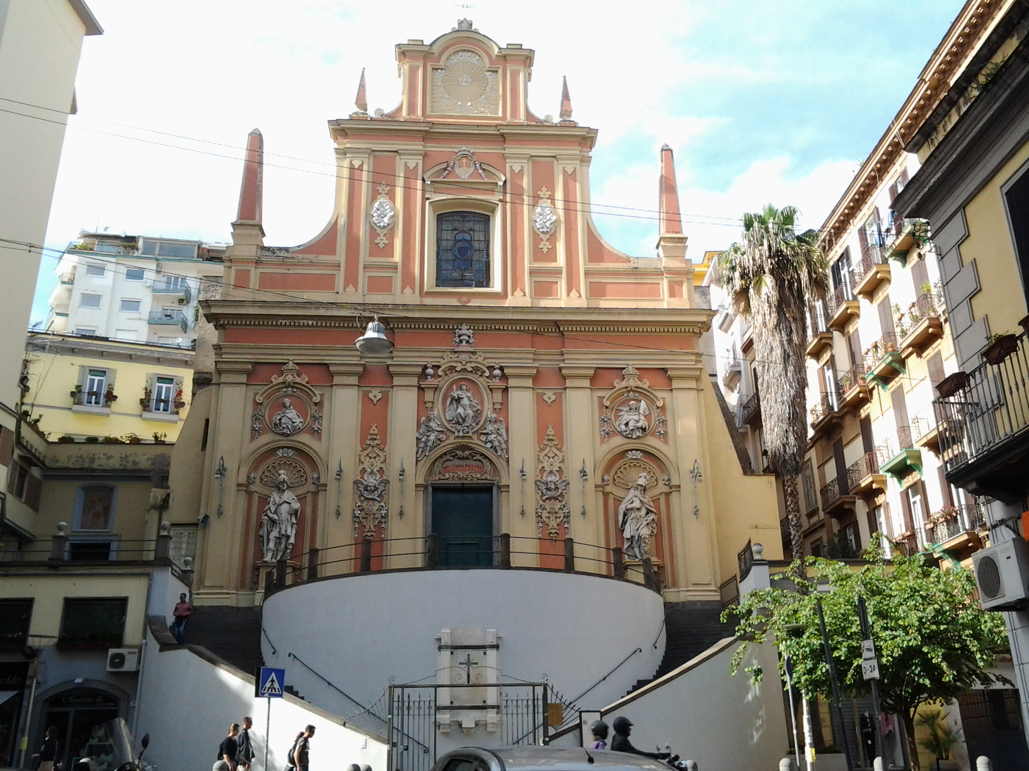 Facciata, Teresa a Chiaia, Napoli